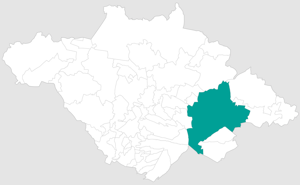 Mapa del municipio de Huamantla